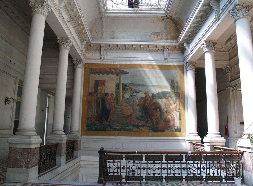 "Quirón El Centauro" Obra Mural de Vicente Puig, ubicada en a sede de la Facultad de Medicina de la Universidad de la República, Montevideo